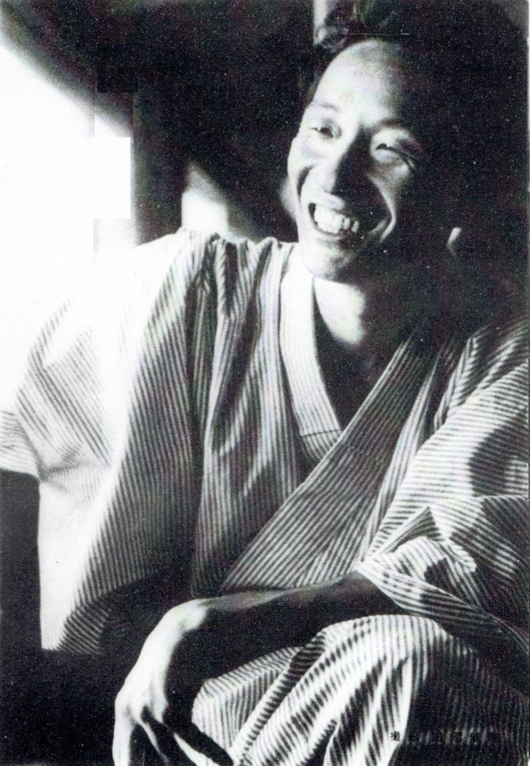 新潮社『週刊新潮』第53巻第10号（1956）より近藤啓太郎。一部キャプションの塗りつぶしあり。